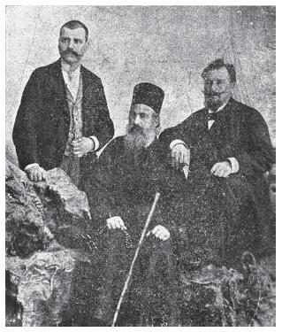 Свeщеник Партений, Андрей Т. Гяуров и Андрей А. Букурещлиев, известни деятели за българска чер ква и училище в Драмско.